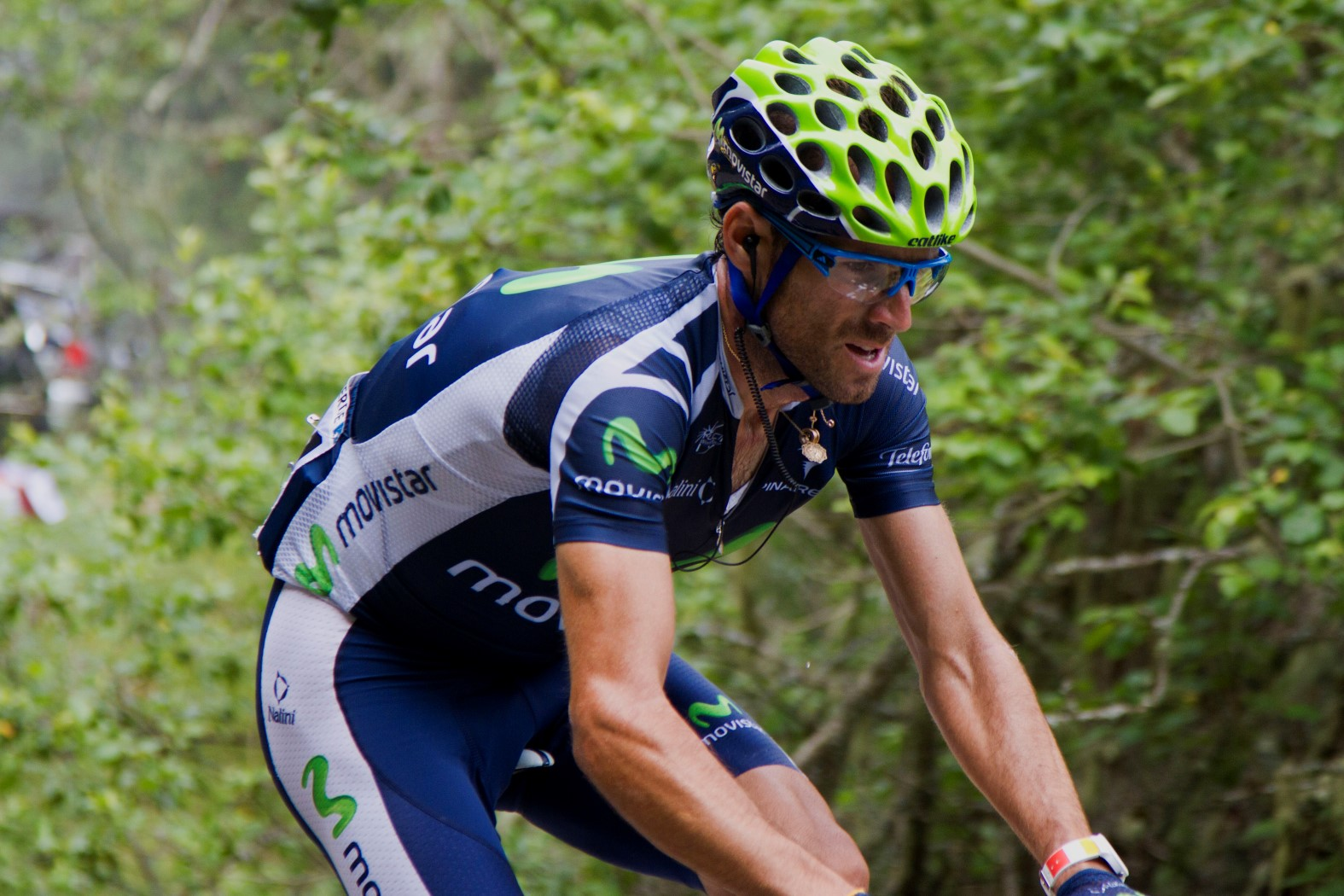 016 ritwinnaar valverde